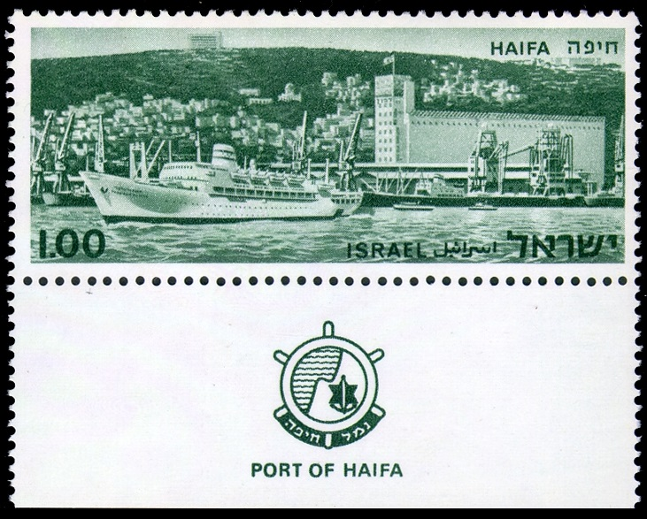 בול נמל חיפה